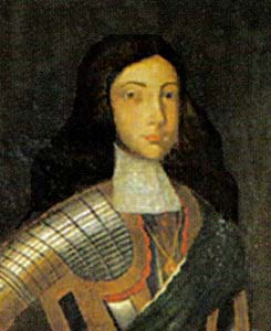 O Príncipe do Brasil D. Teodósio de Bragança (detalhe) - Óleo sobre tela